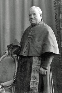 Magnus Niedermair (1849-1922) Domkapitular und Generalvikar in Augsburg.